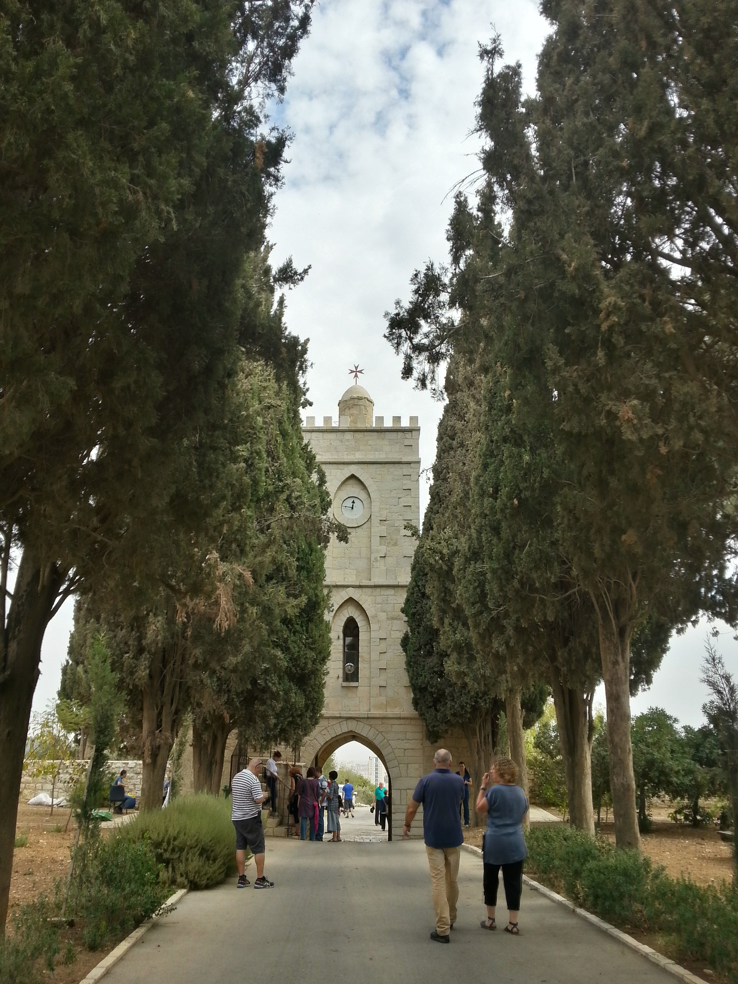 מכון טנטור - שער הכניסה במבט מכיוון החצר הפנימית